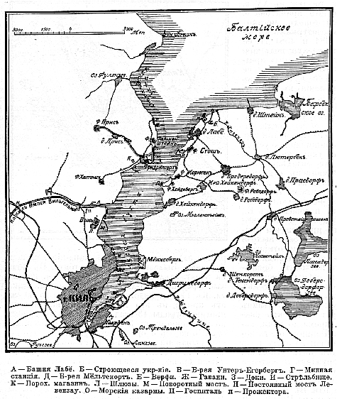 Это изображение было использовано для иллюстрирования статьи «Киль (город)» опубликованной в двенадцатом томе «Военной энциклопедии», который был издан книгоиздательским товариществом И. Д. Сытина в 1913 году в столице Российской империи городе Санкт-Петербурге. А — Башня Лабё. Б — Строящееся укрепление. В — Батарея Унтер-Егерберг. Г — Минная станция. Д — Батарея Мёльтенортъ. Е — Верфи. Ж — Гавани. 3 — Доки. И — Стрельбище. К — Порох. магазин. Л — Шлюзы. М — Поворотный мост. Н — Постоянный мостъ Левензау. О — Морские казармы. П — Госпиталь. п — Прожектора. Более подробное описание к этой картинке можно прочесть в указанной выше статье.